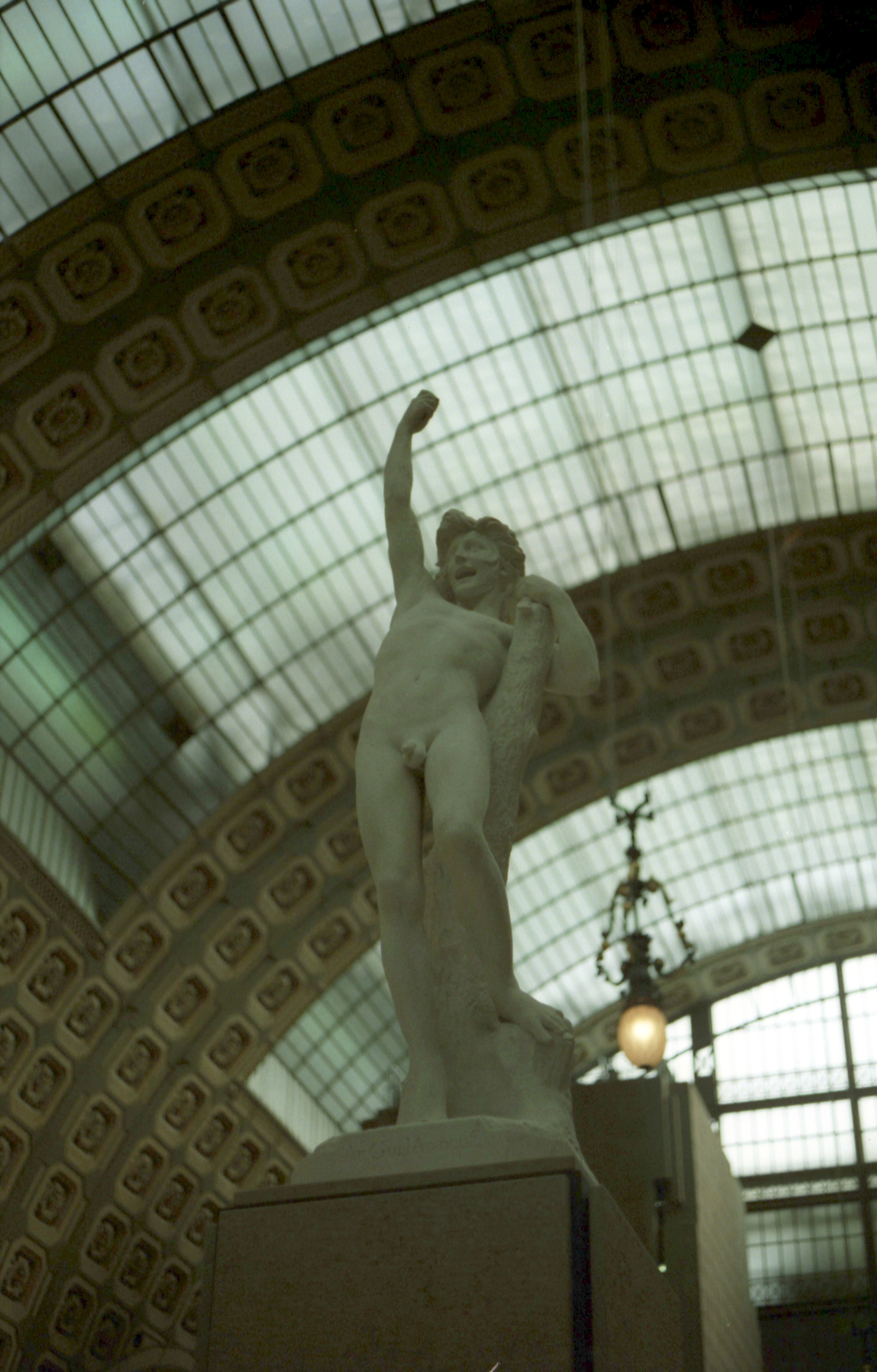 Jeune Gaulois au gui l'an neuf, ca 1870-1875, sculpture by Jean-Baptiste Baujault